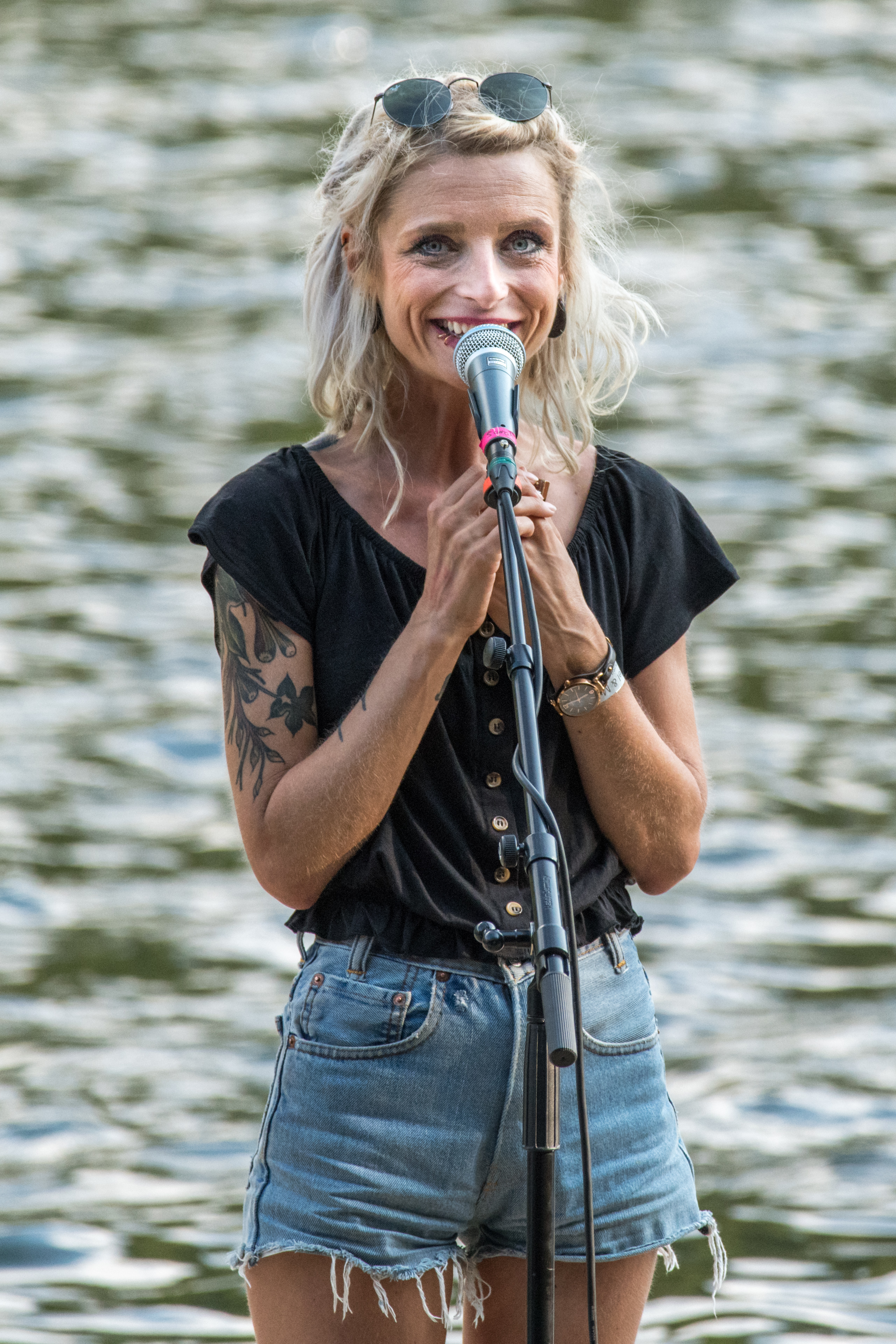 Sarah Lesch und Benni Benson bei 'Sprudel, Sprudel & Musik' in Gößl (2018)